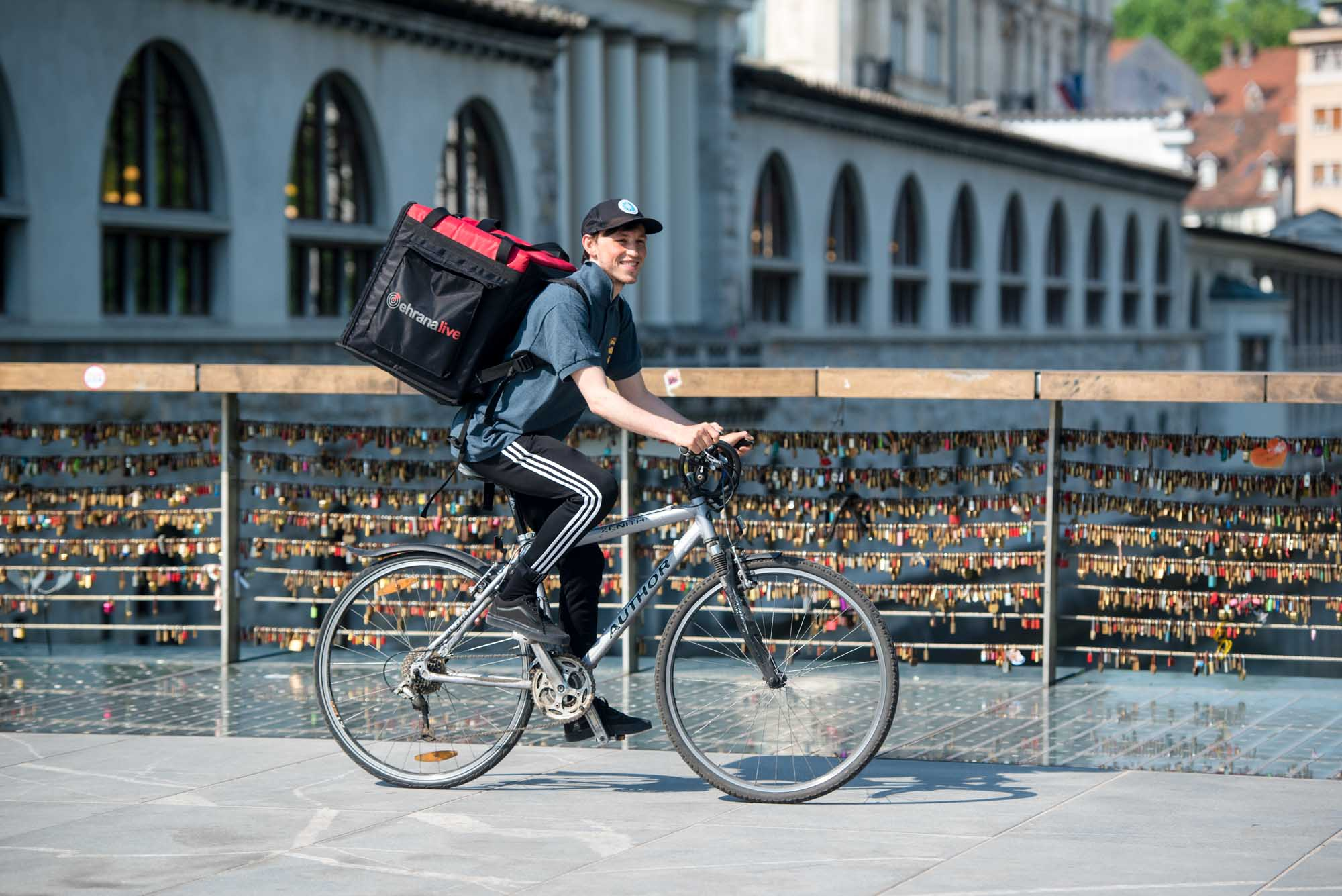 ehrana Live dostavljalec v Ljubljani